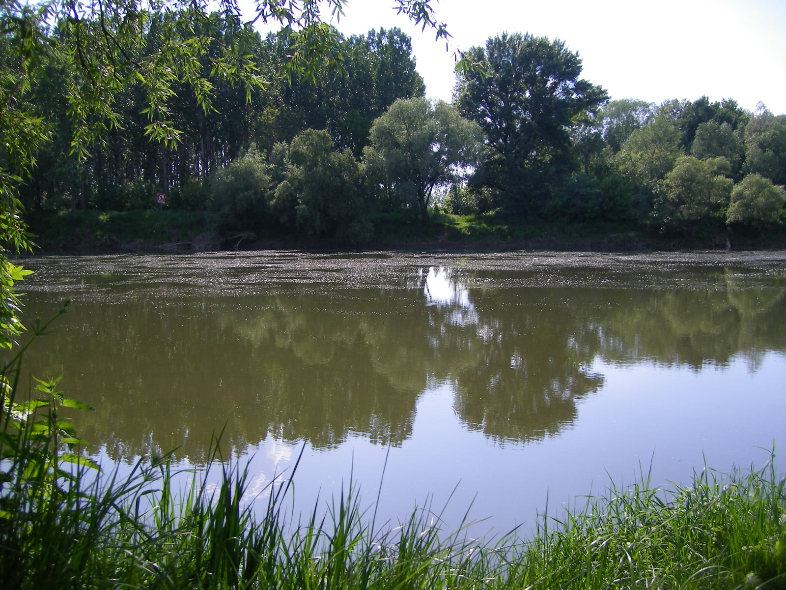 Kamocsa - Vág-part